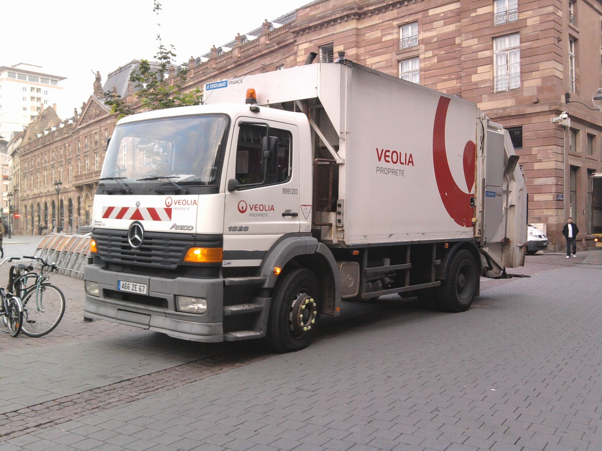 Camion poubelle Mercedes-Benz de Veolia Propreté sur la place Kléber, Strasbourg